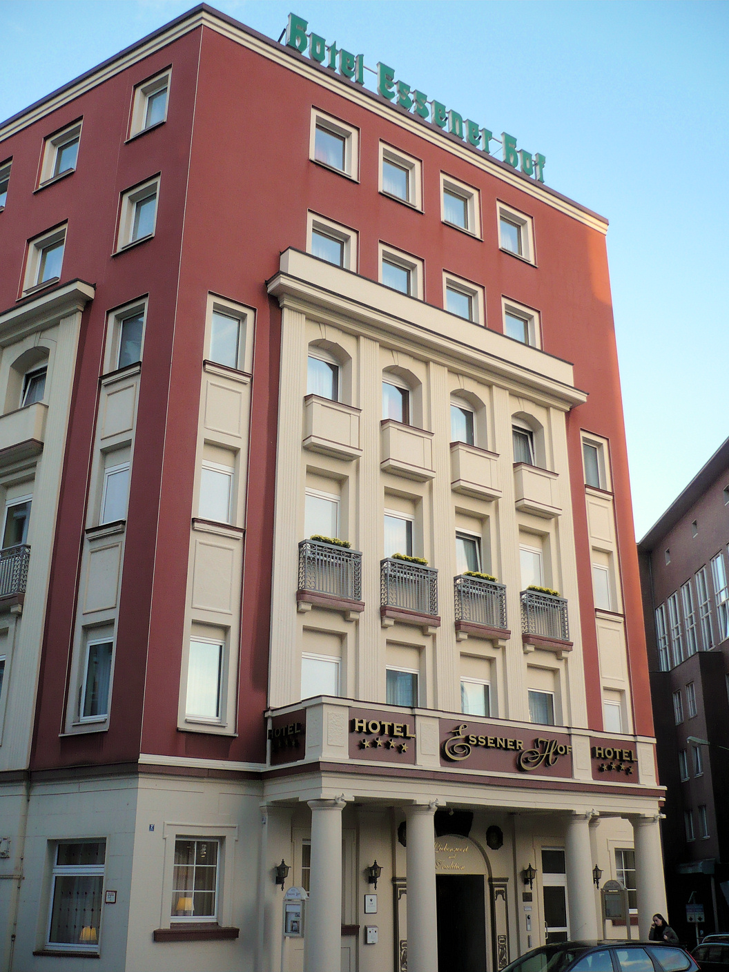 Hotel Essener Hof im Essener Zentrum